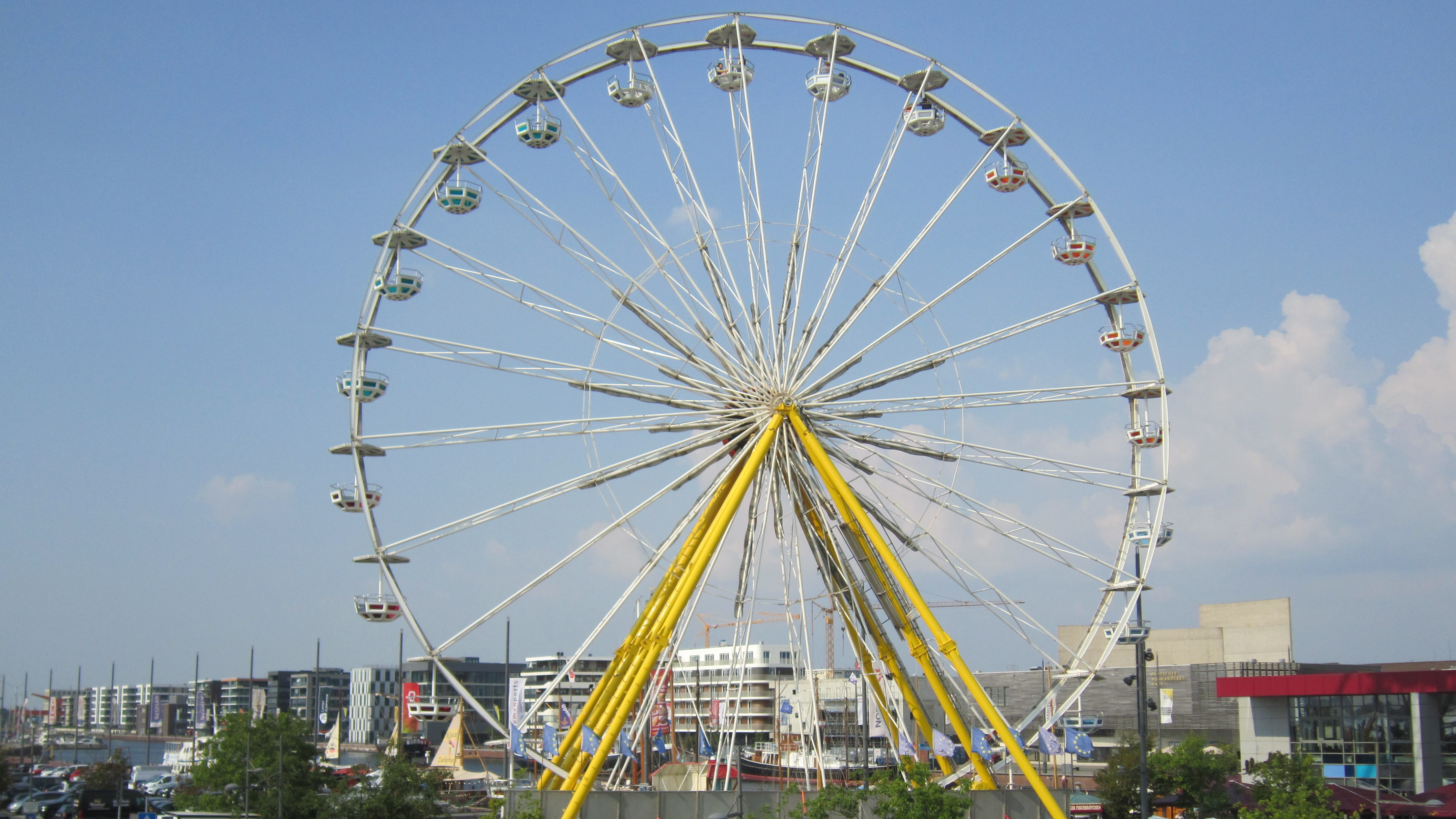 Während der Zeit des Verbots von Großveranstaltungen wegen der COVID-19 Pandemie wurden in vielen deutschen Städten, teils monatelang, Riesenräder und andere jahrmarkttypische Einrichtungen aufgestellt, auch am Neuen Hafen in Bremerhaven.